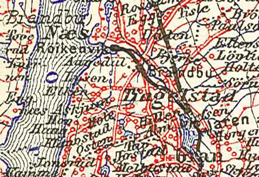 Kart over Røykenvikbanen